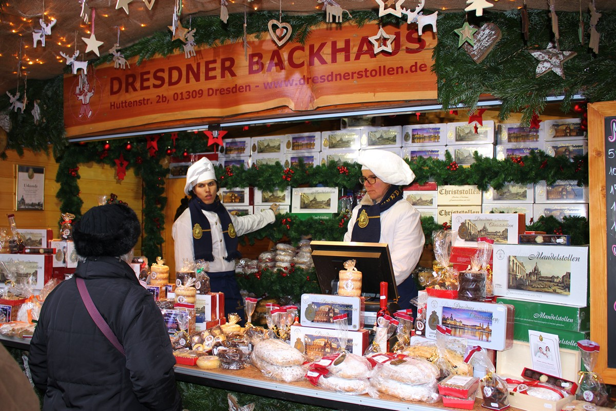 Verkauf von Dresdner Christstollen auf dem Dresdner Weihnachtsmarkt